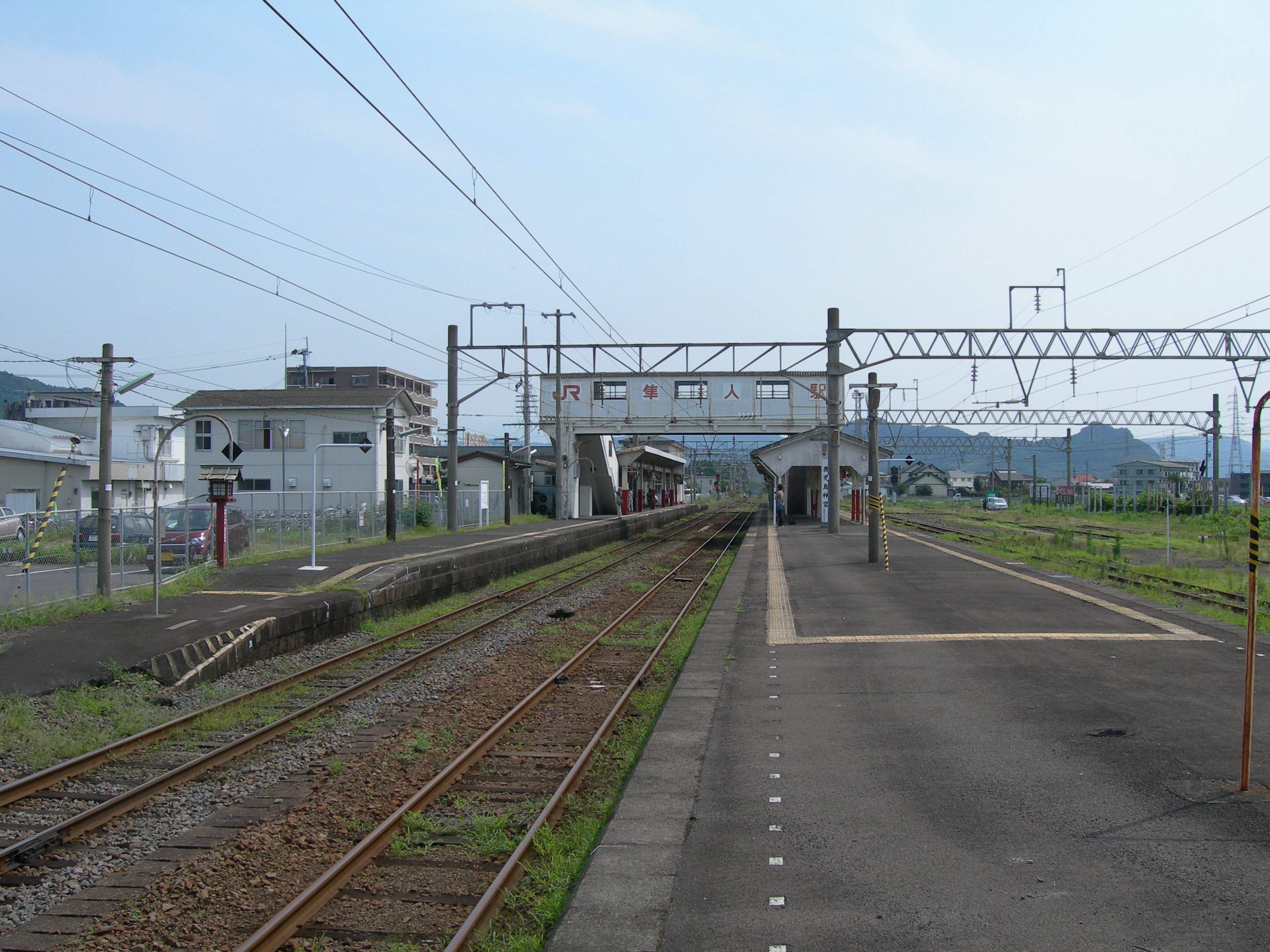 隼人駅プラットホーム